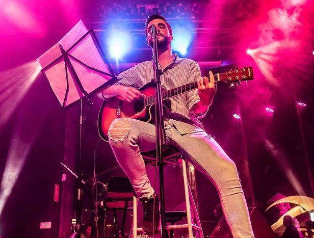 Alejandro Santana durante un concierto.